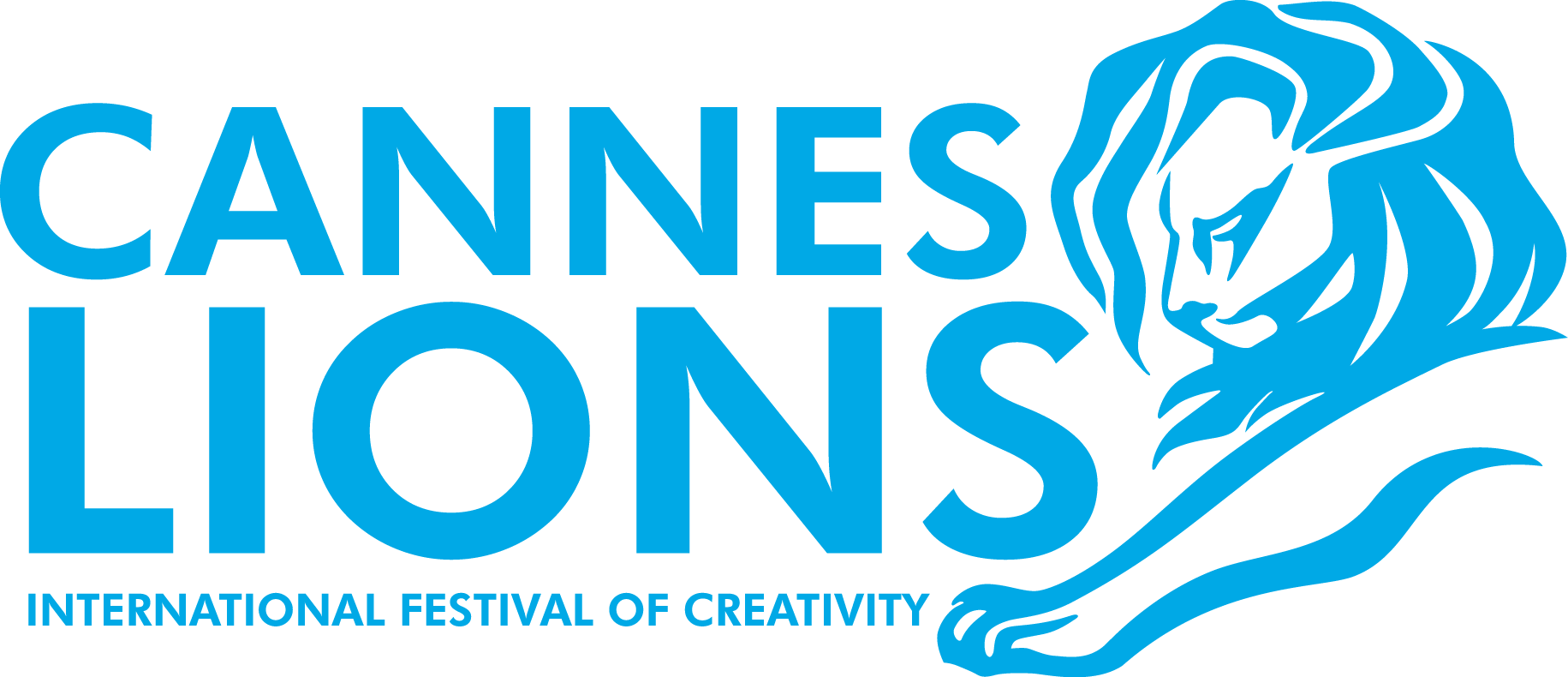 Логотип Міжнародного фестивалю творчості Канські Леви